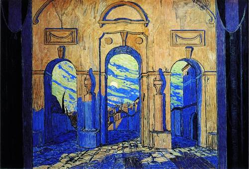 У стен Мадрида. 1917 Эскизы декораций к опере А.С. Даргомыжского "Каменный гость" Фанера, темпера, бронза, серебро. 79 x 115 см Государственный Русский музей